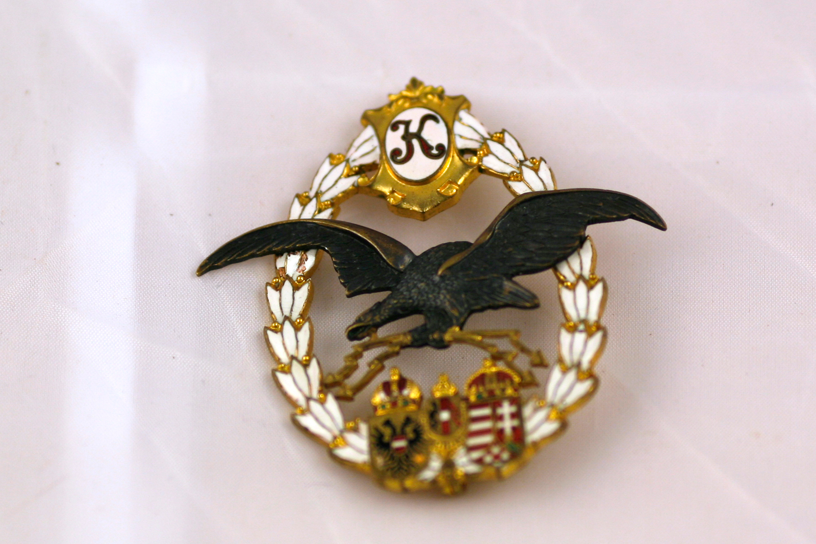 Letalstvo je bilo na soški fronti zelo pomembno, obstajalo je okoli dvanjast letališč. Letališče na Ajševici so premaknili zaradi premika fronte. V okviru letalskih enot so izvajali različne naloge. Najprej so izvajali le poizvedovanje, opazovanje bojišča. Potem so začeli uporabljati letala kot izvidnike-lovce in pa bombniške enote. Vzporedno se je začela razvijati tudi protizračna obramba. O tem pričajo tudi različne značke in oznake, izdan pa je bil tudi poseben priročnik za avstroogrske letalske enote.